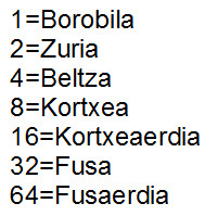 Konpasak